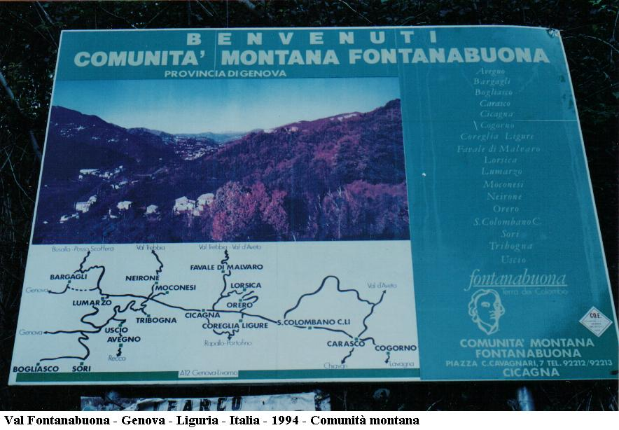 Val Fontanabuona - Genova - Italia - 1994 - Comunità montana - Tutti i paesi della Fontanabuona